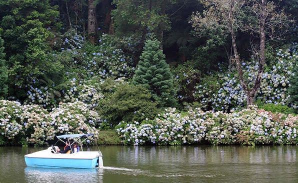 Paisagem do famoso Lago Negro em Gramado, RS, Brasil.